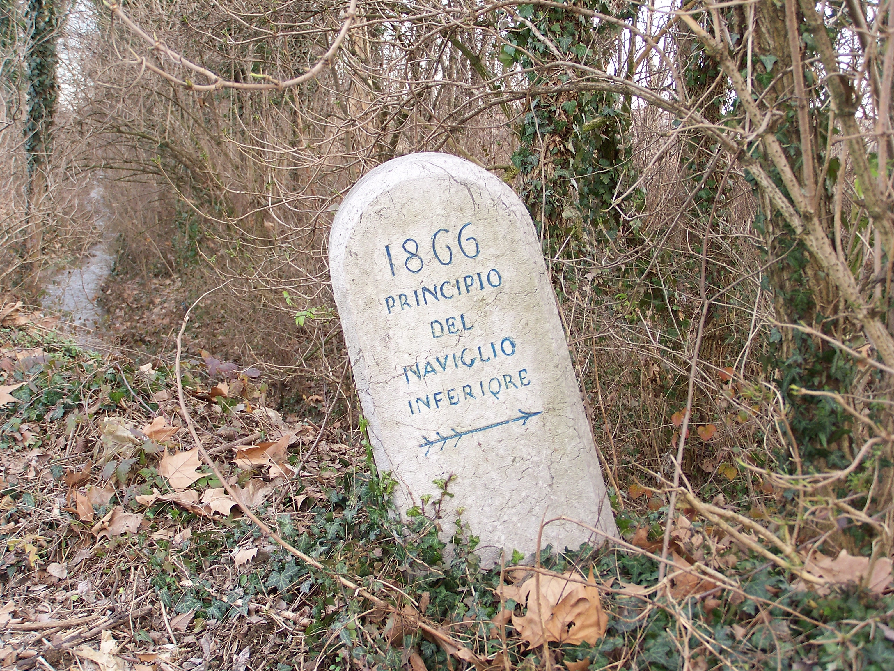 Cippo del 1866 posto tra i confini dei comuni di Borgosatollo e San Zeno indicante il principio del Naviglio Inferiore, inglobante a quei tempi anche il Naviglio di San Zeno.